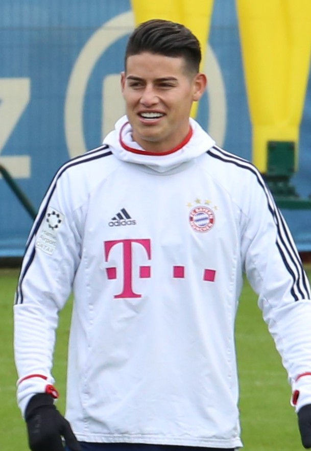 James Rodríguez beim Training auf dem Gelände des FC Bayern München (Januar 2018)